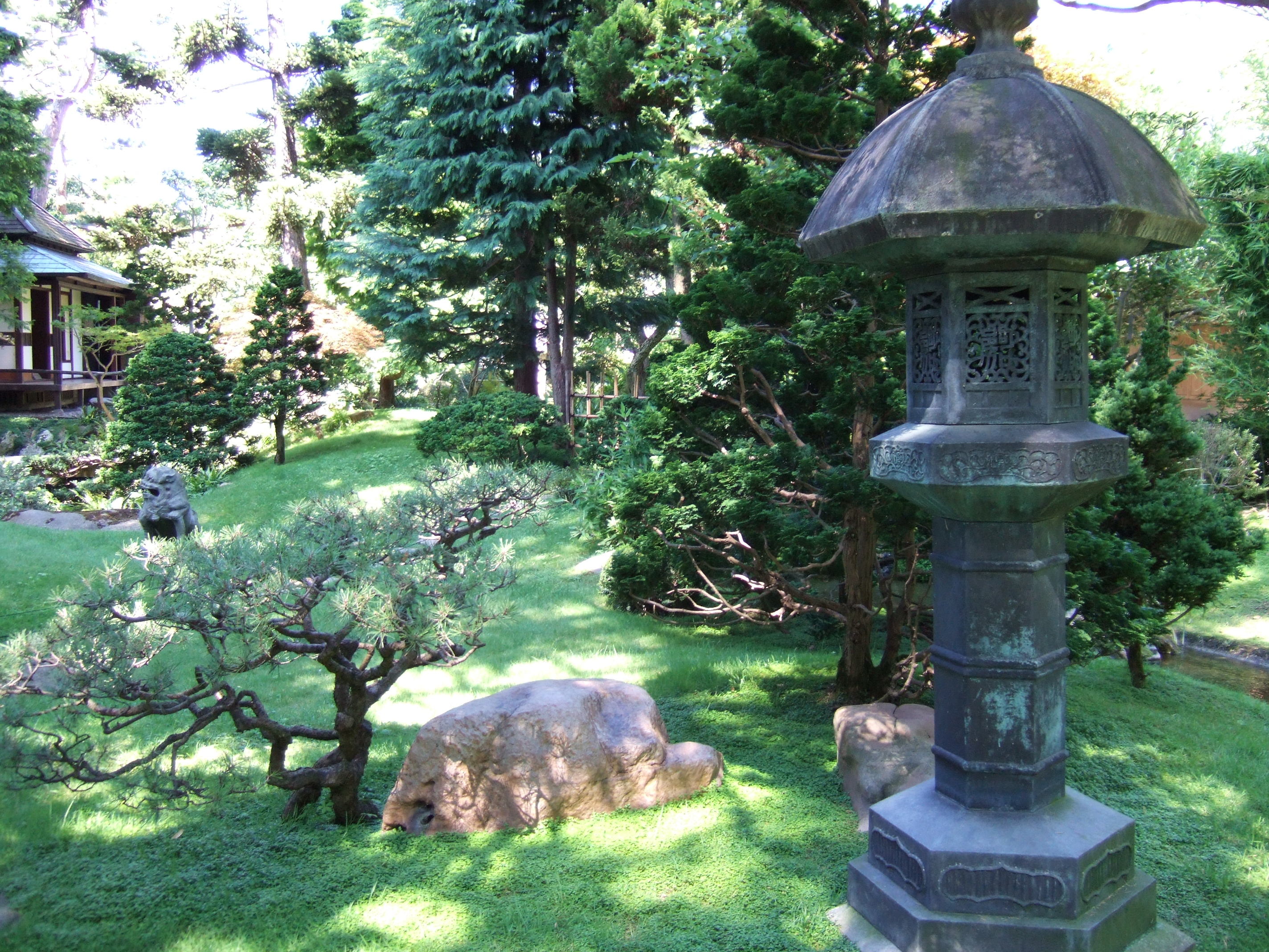 Photo prise par Yves Fraysse dans le jardin japonais du musée Albert-Kahn de Boulogne-Billancourt (France)